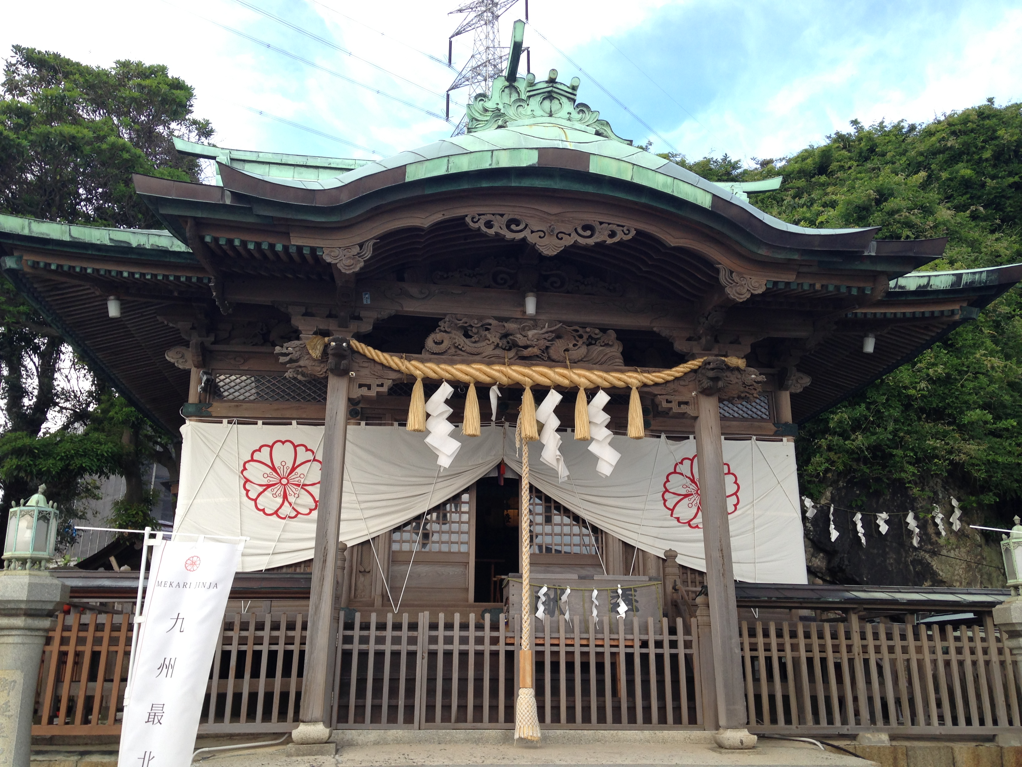 和布刈神社の拝殿